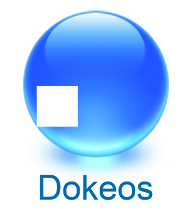 Logo de Dokeos représentant un carréé dans un rond, allusion aux insolubilia médiévales popularisées sous l'expression Chercher la quadrature du cercle.